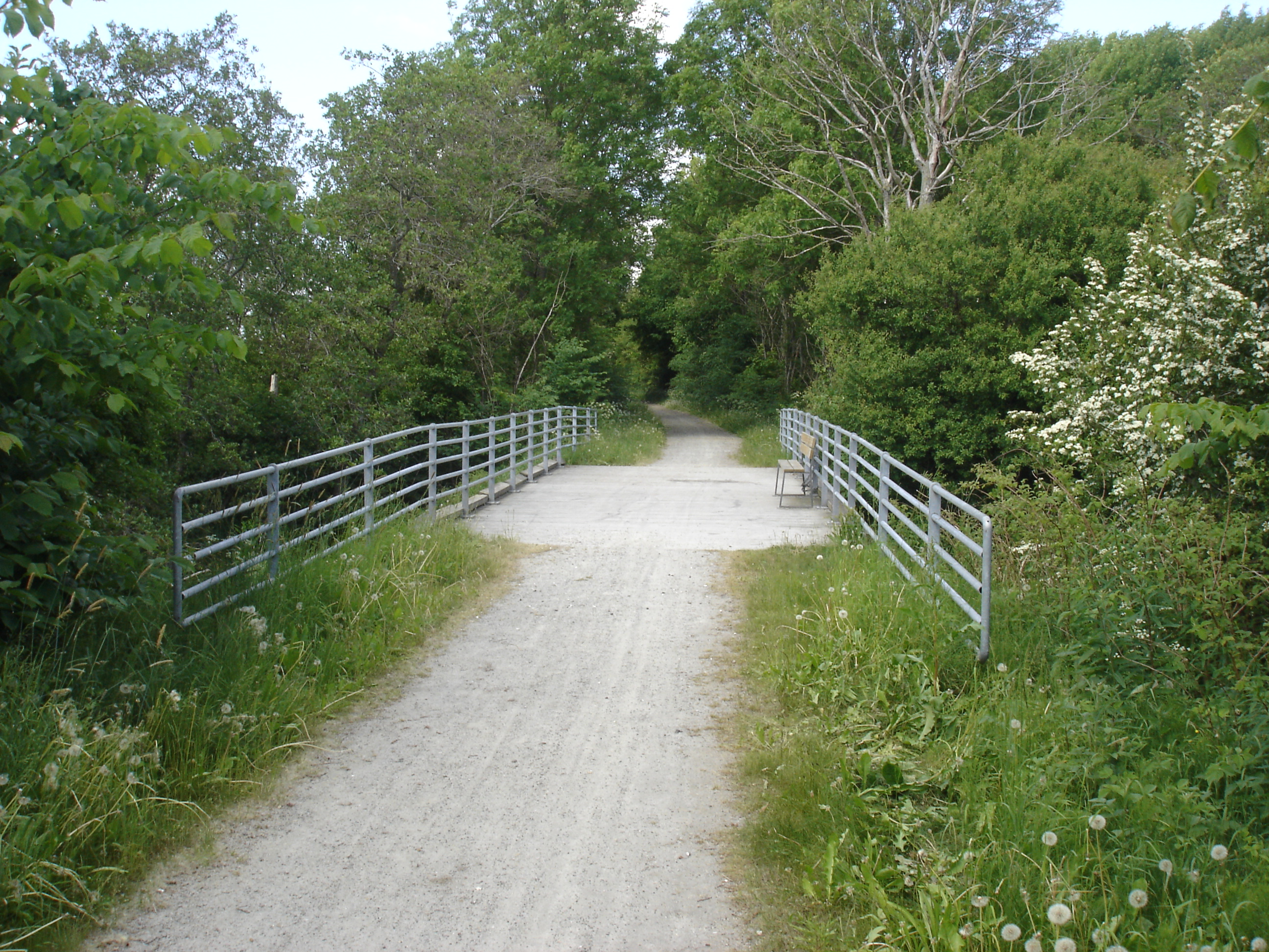 Himmerlandsstien passerer Lerkenfeld Å S for Østrup